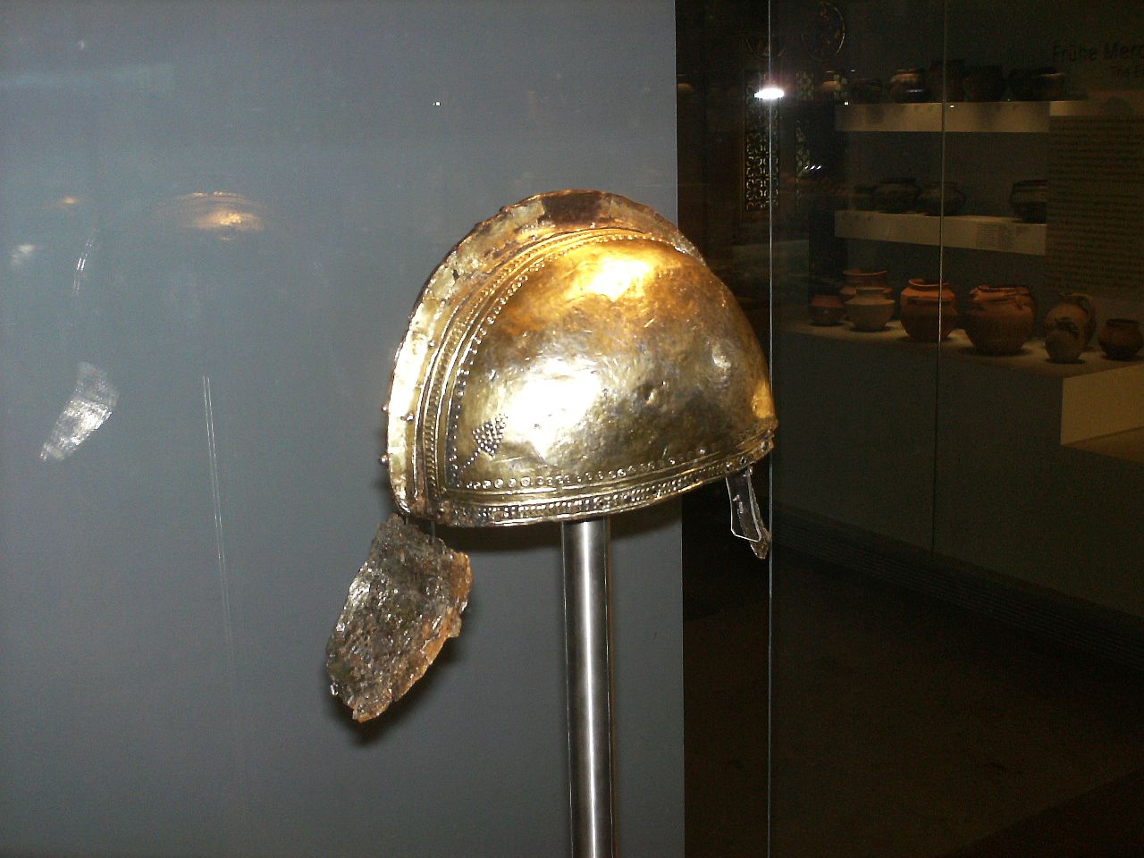 Spätantiker Offiziershelm mit Goldblechüberzug und Weinraubenornamenten. Gefunden in der Wertach, Römisch-Germanisches Museum, Nürnberg.